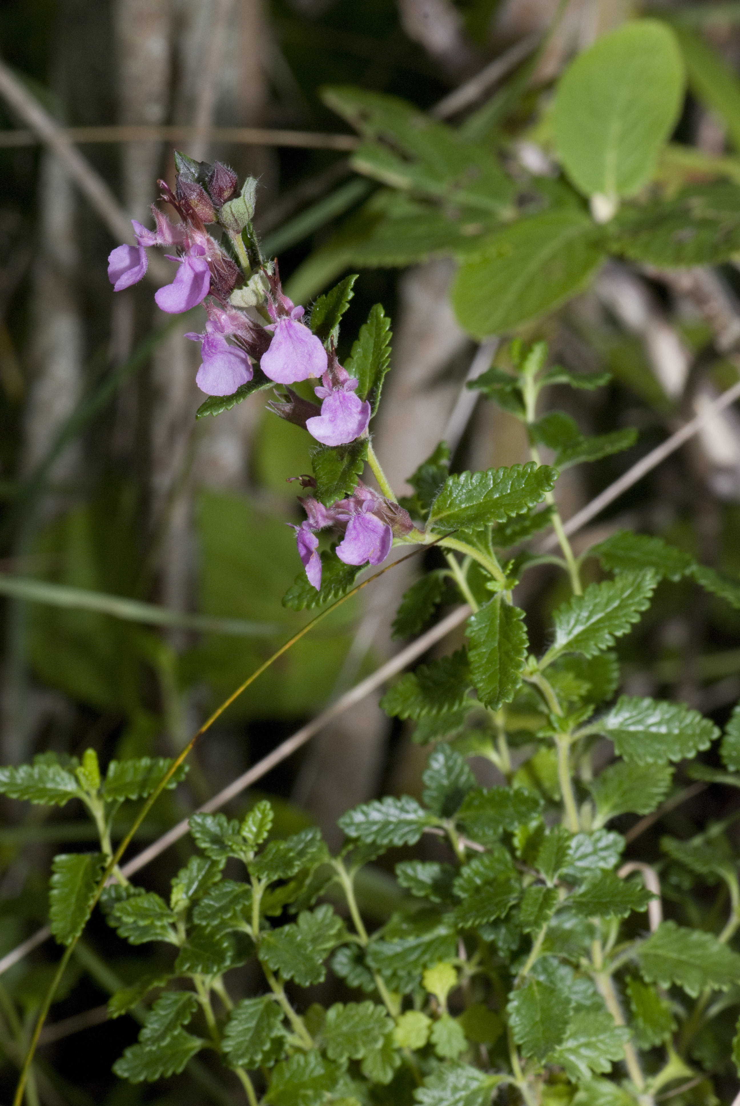 Teucrium chamaedrys-subsp-germanica Coteau de Chartèves (Aisne), France